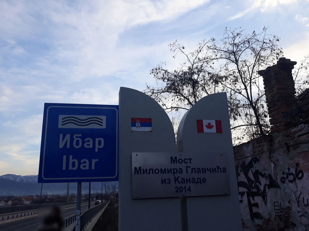 Мост преко Ибра у Краљеву, којим је Скопљанска улица спојена са десном обалом реке. Изграђен је донацијом Миломира Главчића, српског добротвора из Канаде, а отворен 2014. године.